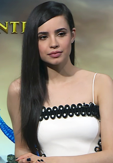 Descendientes 2 narra la historia de “Mal” y sus amigos, los hijos adolescentes de los famosos villanos de Disney